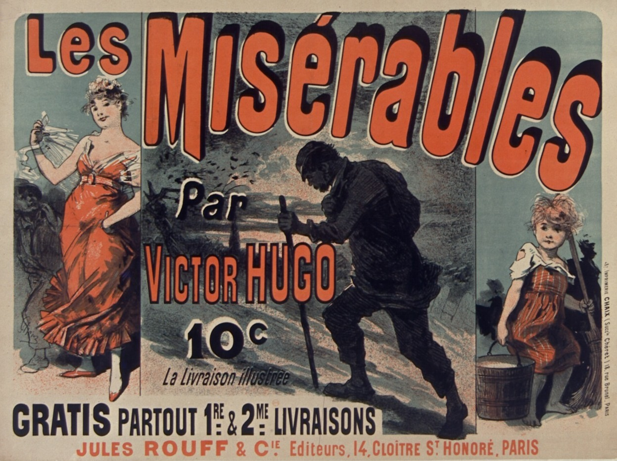 Les Misérables, affiche publicitaire de Jules Chéret pour une édition du roman de Victor Hugo publiée chez Jules Rouff, 1886.